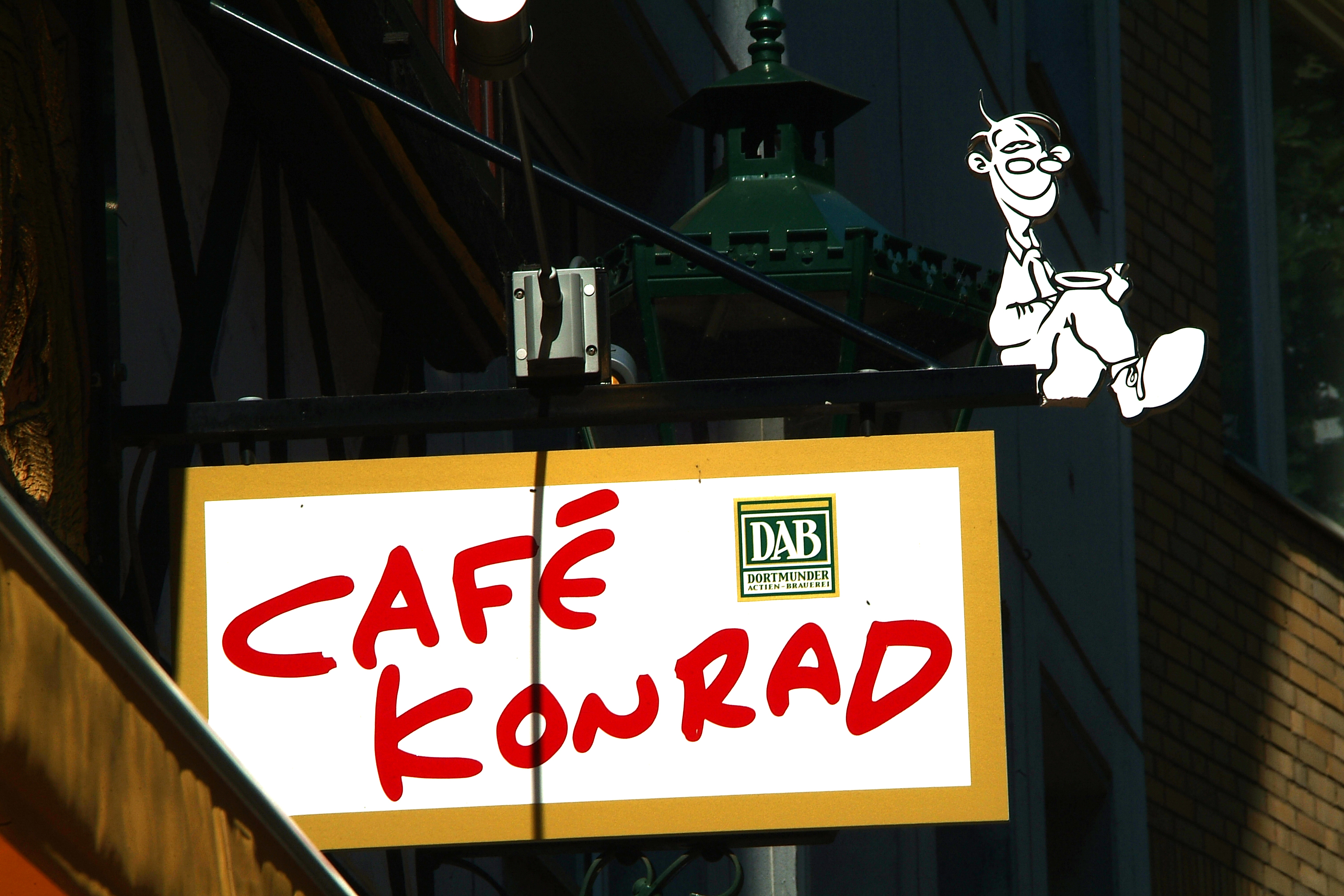 Die Comic-Figur des Konrad ("Konrad und Paul") schuf der schwule Comic-Zeichner und Autor Ralf König ("Der bewegte Mann"). Seit 1996 ziert die Figur das Café Konrad" ...